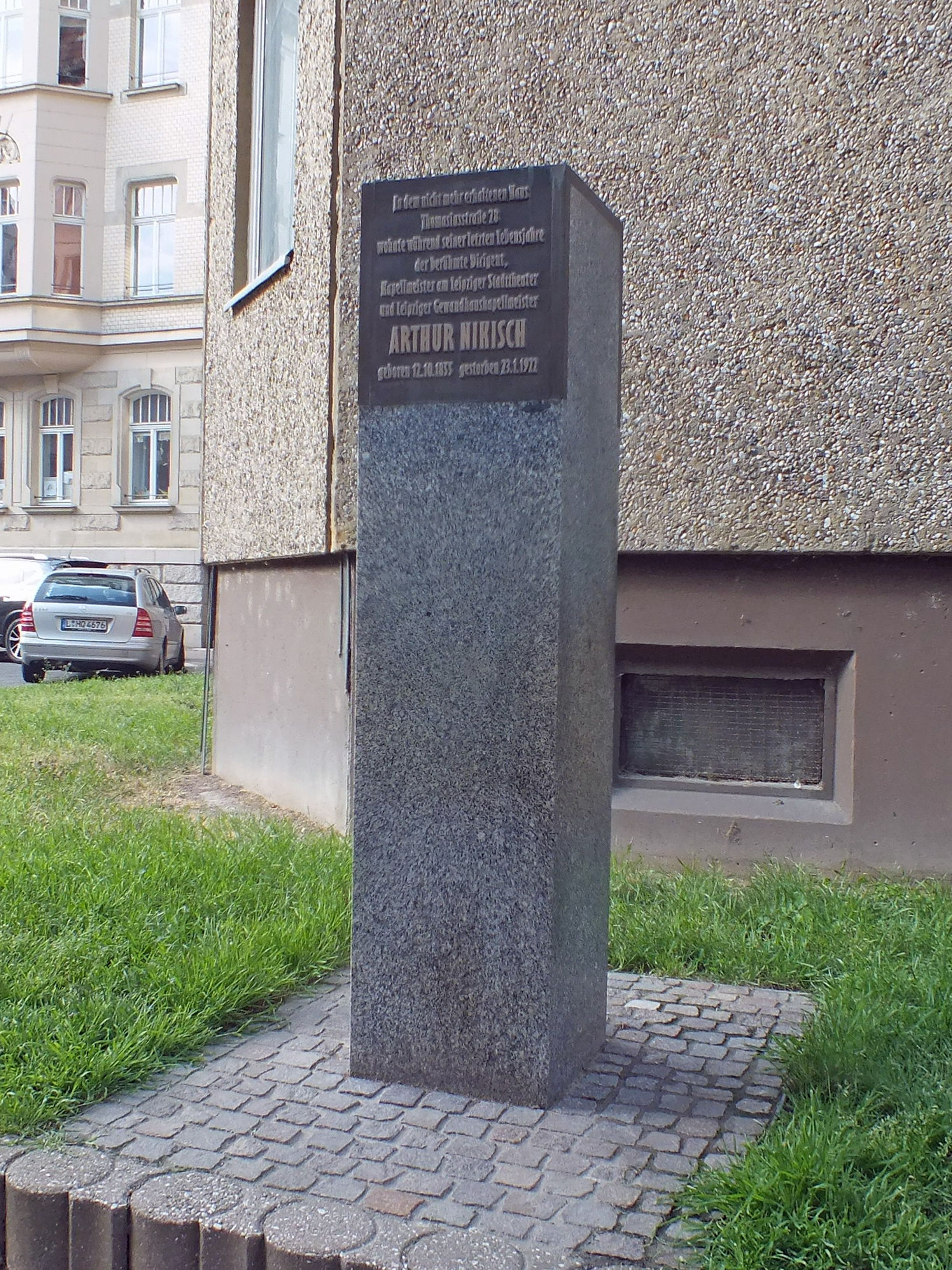 Gedenkstein für Arthur Nikisch vor dem Haus Thomasiusstraße 32 (früher 28) am Nikischplatz in Leipzig